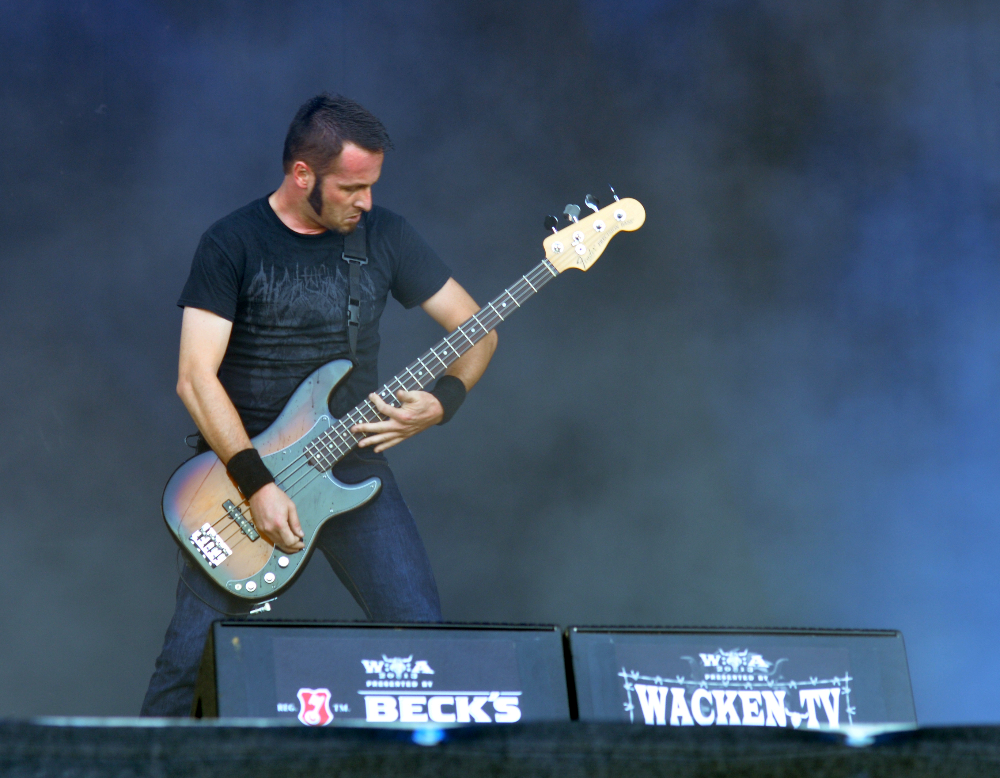 Gojira at Wacken Open Air 2013